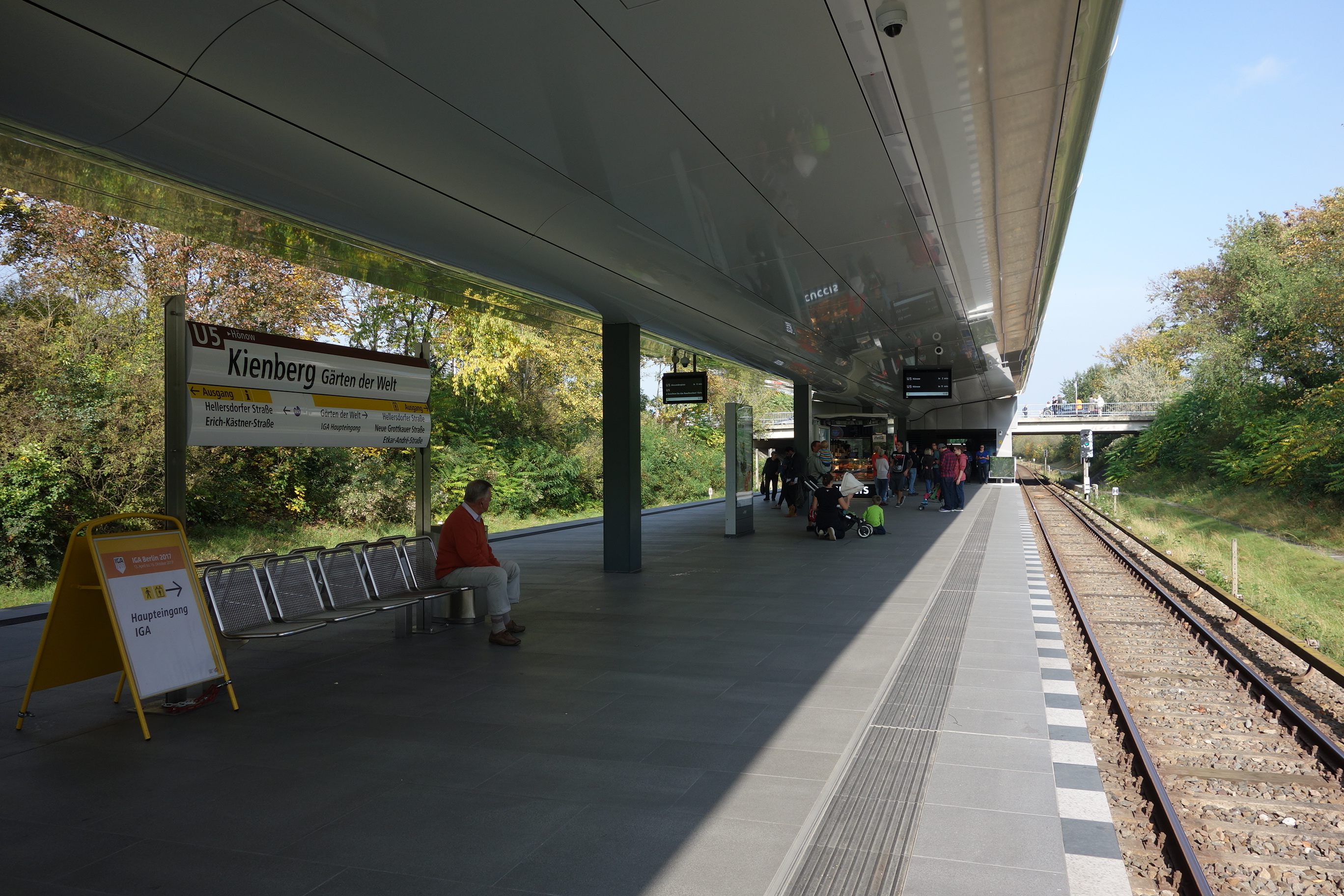 Bahnsteig des U-Bahnhofs Kienberg (Gärten der Welt) in Berlin während der IGA 2017